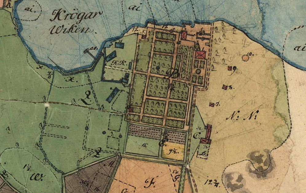 Malmviks gård på en karta från 1753